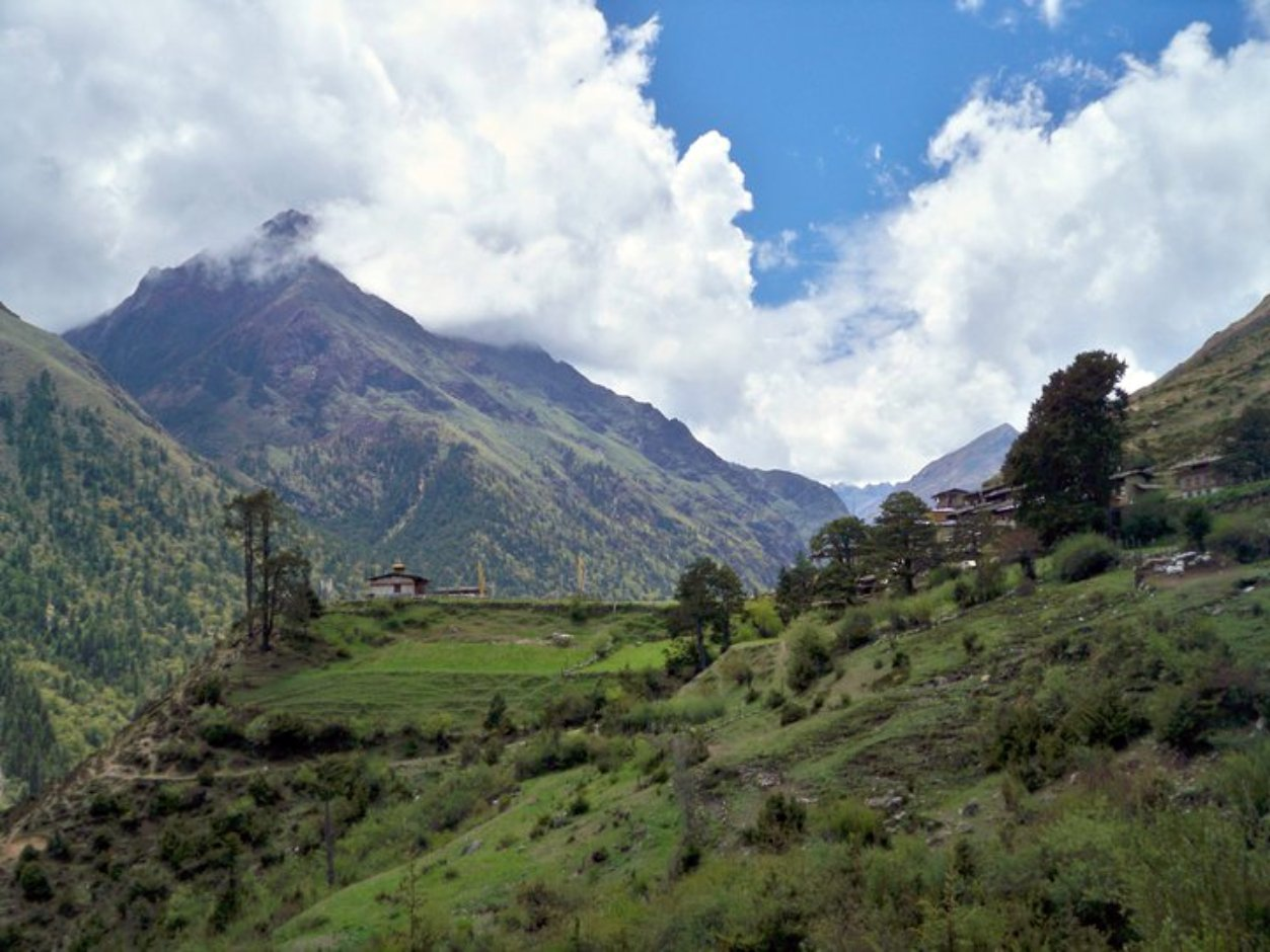 Himalayan Landscape in Bhutan